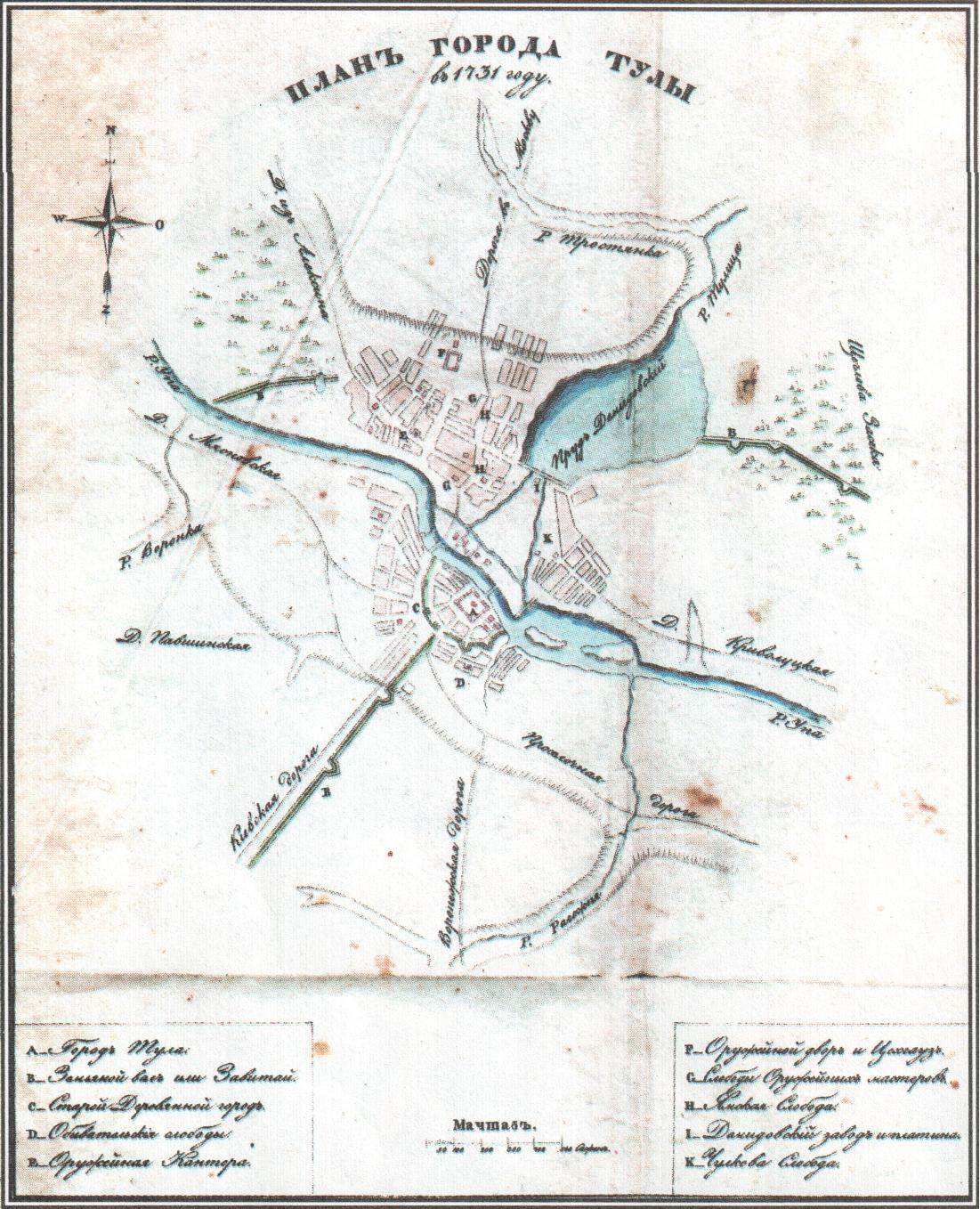 карта Тулы в 1731 году